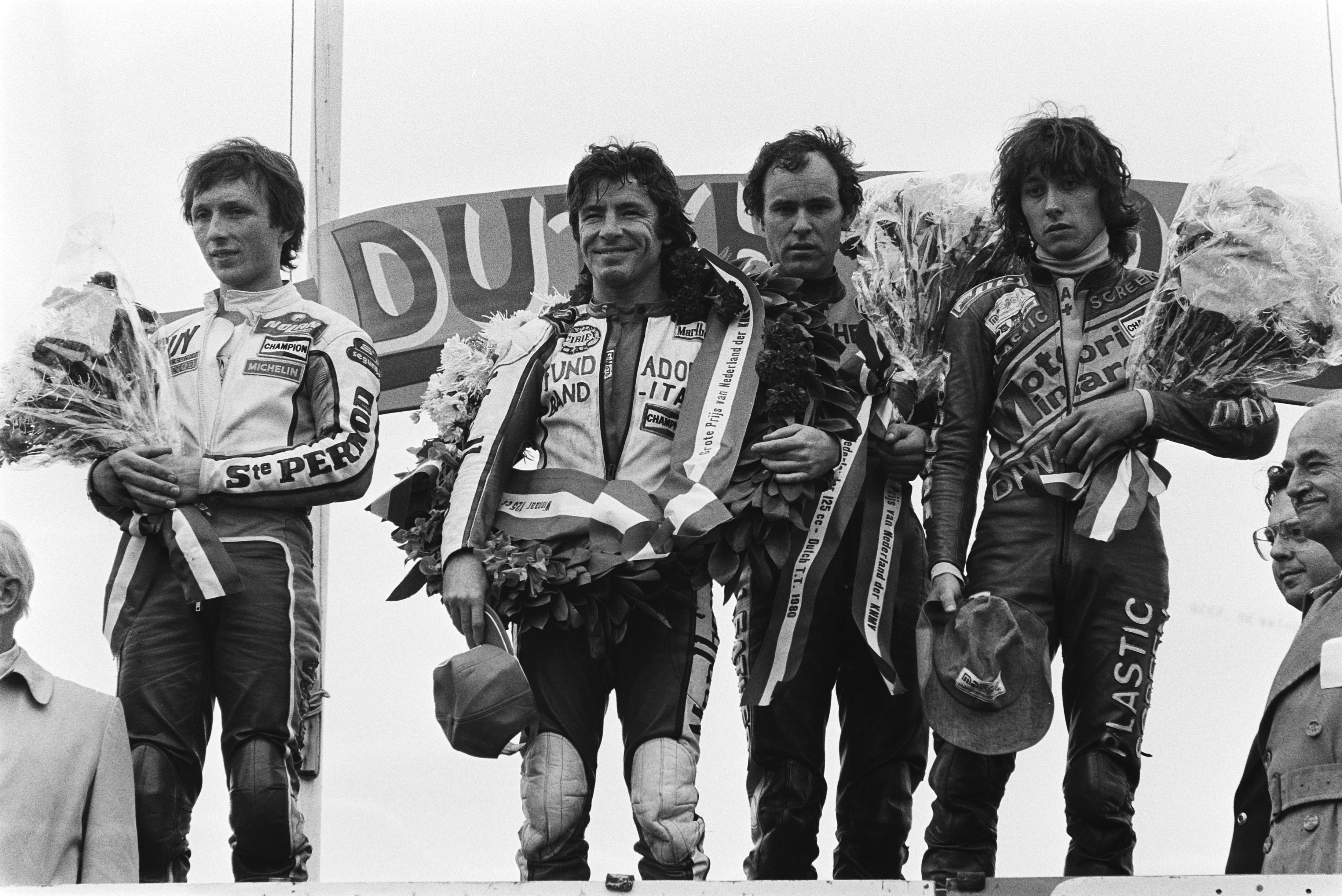 Collectie / Archief : Fotocollectie Anefo Reportage / Serie : TT Assen 1980 Beschrijving : TT Assen ; huldiging na 125 cc race , v.l.n.r. Bertin (2e), Nieto (1e), van Kessel (8e) (NL), Regianni (3e) Datum : 28 juni 1980 Locatie : Assen Trefwoorden : huldigingen, motorcoureurs, motorraces, motorsport, sport Persoonsnaam : Bertin, Guy, Kessel, Henk van, Nieto, Angel, Regianni, Loris Fotograaf : Pereira, Fernando / Anefo Auteursrechthebbende : Nationaal Archief Materiaalsoort : Negatief (zwart/wit) Nummer archiefinventaris : bekijk toegang 2.24.01.05 Bestanddeelnummer : 930-9044